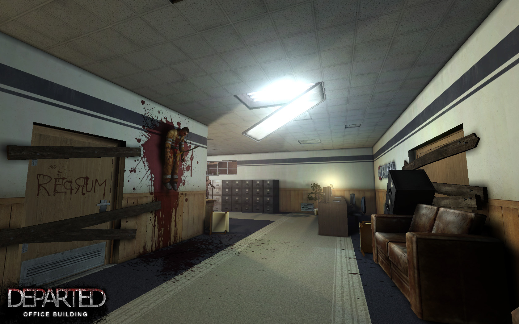 Action du jeu vidéo Killing Floor